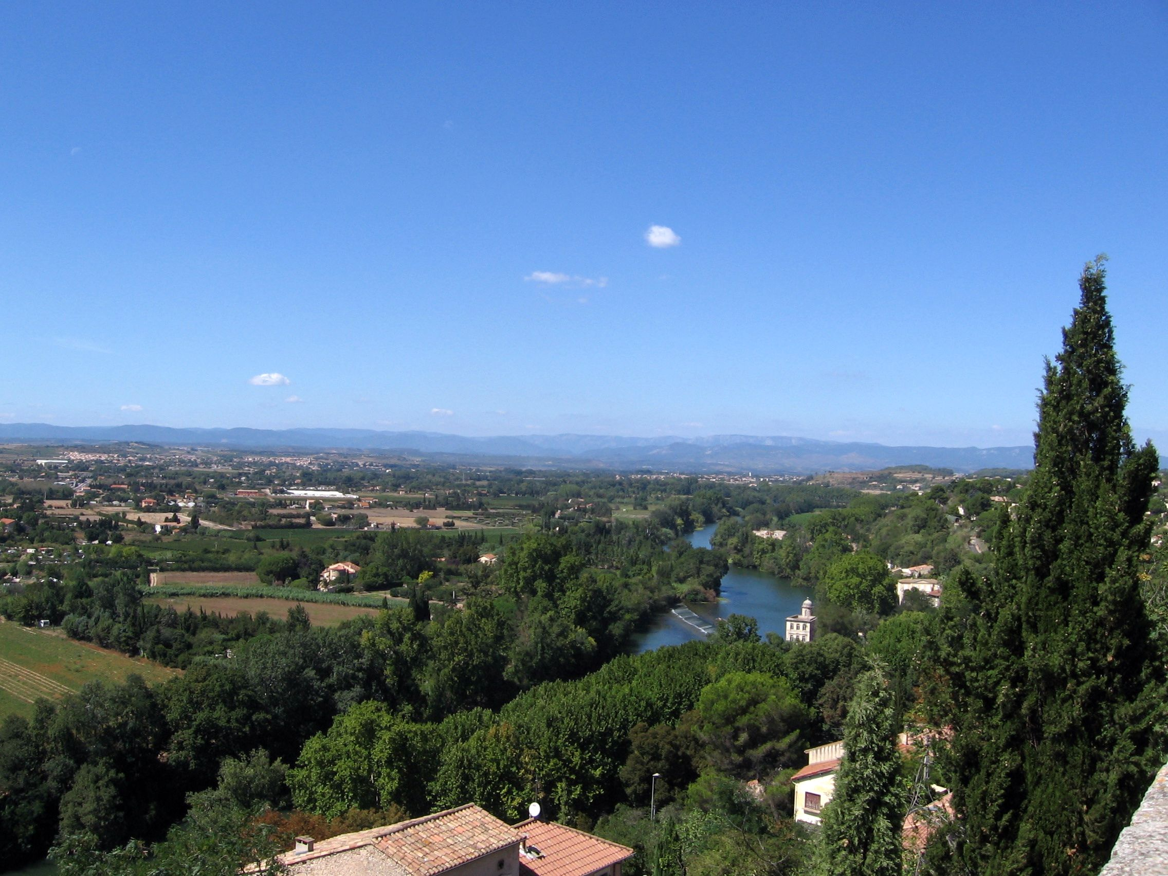 Oberes Orbtal, von Béziers aus gesehen